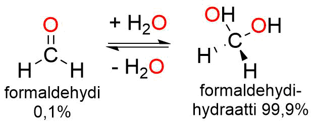 Formaldehydi esiintyy vesiliuoksessa lähes täydellisesti hydraattina.